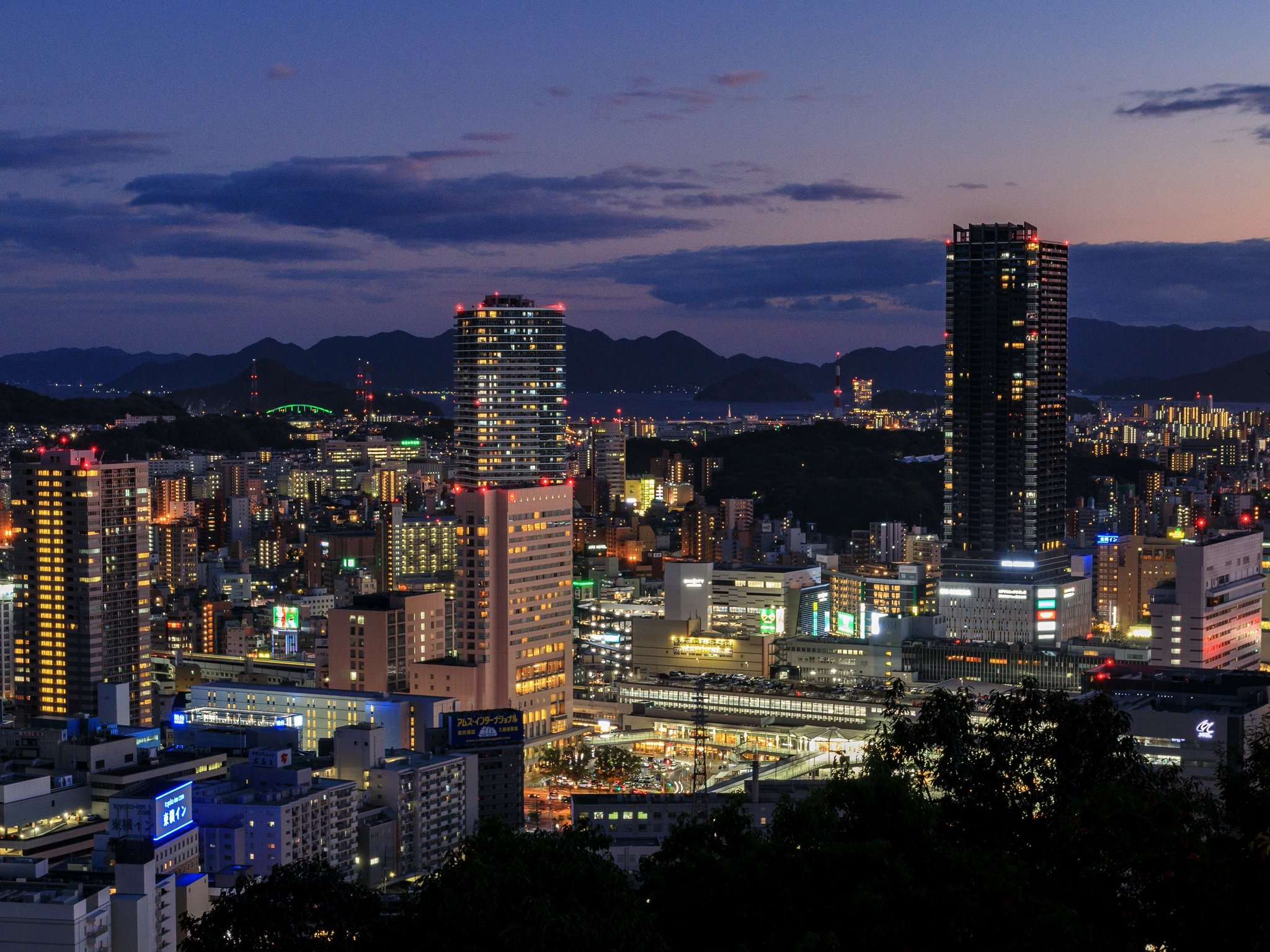 二葉山から見た広島駅周辺の夜景